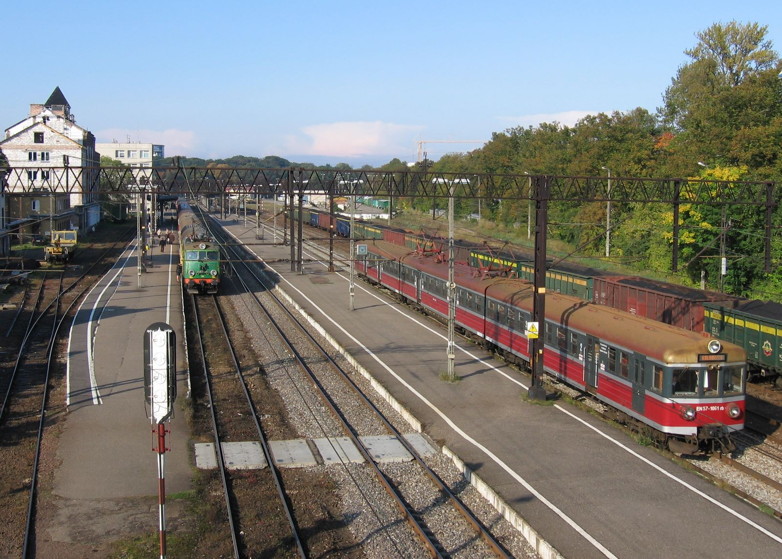 Perony w Kołobrzegu